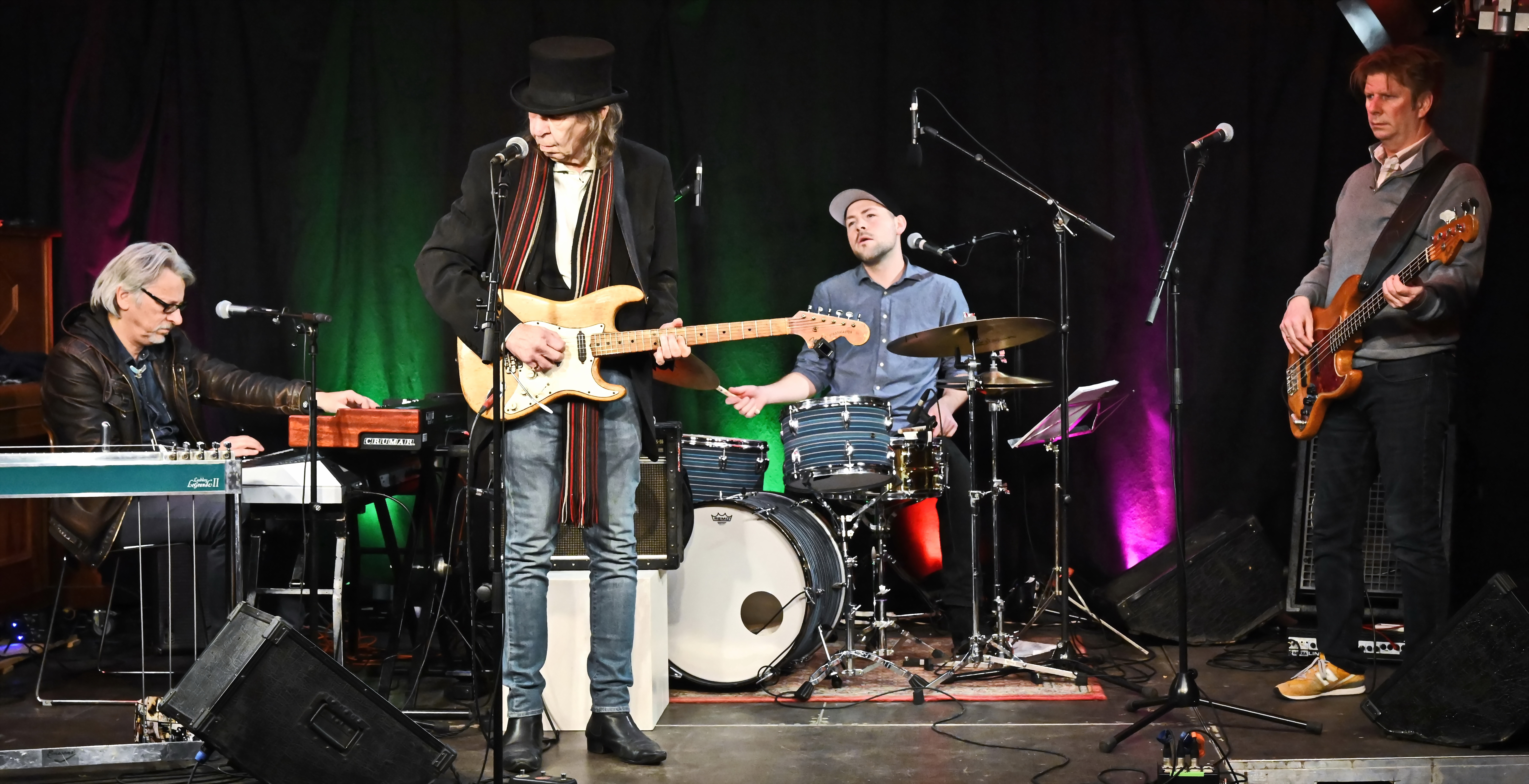 Nick Woodland mit Klaus Reichardt, Manfred Mildenberger und Tom Peschel